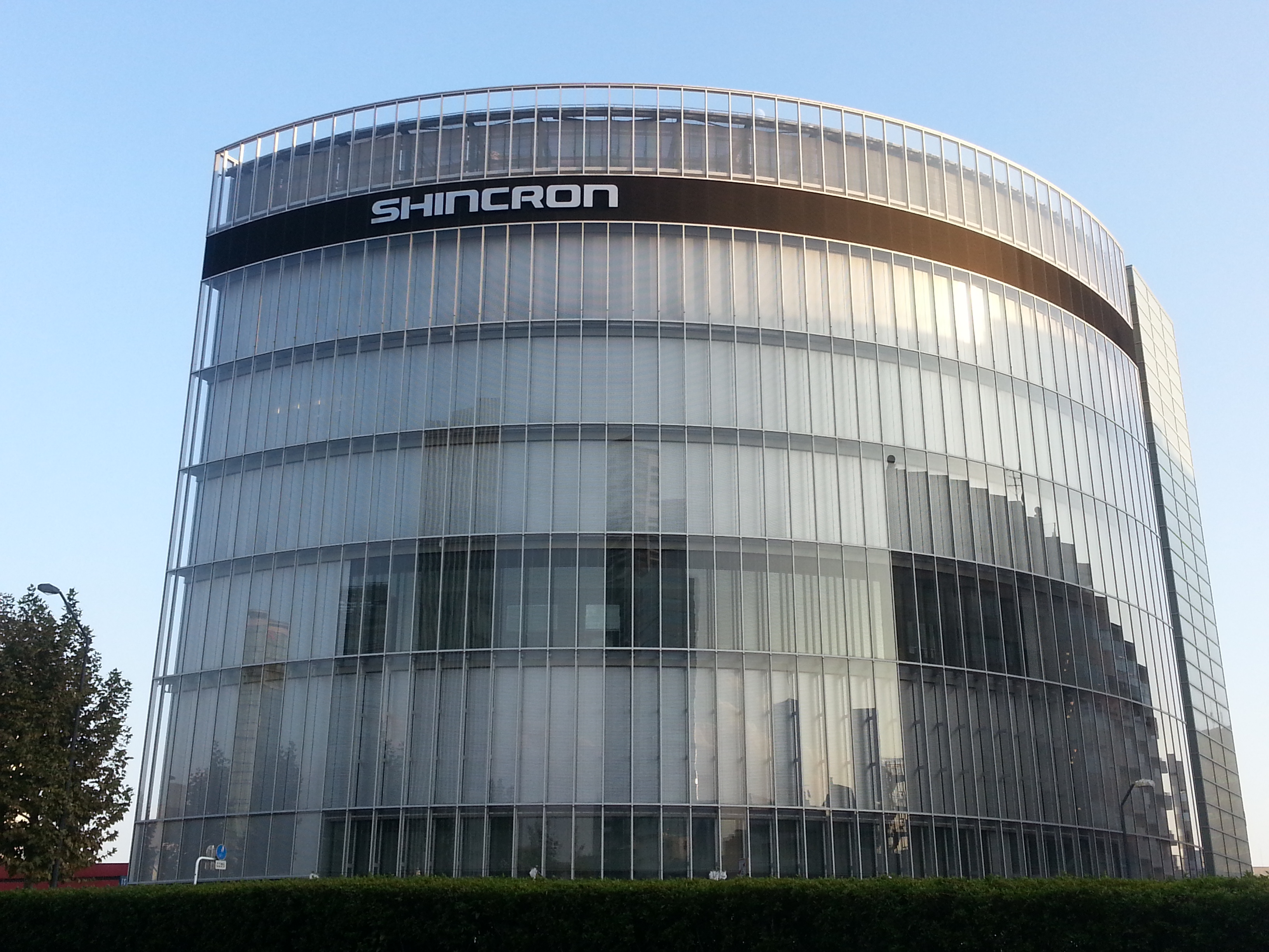 横浜みなとみらい地区にあるシンクロン本社ビル。※第二本社ビル（奥に増築）は建設中